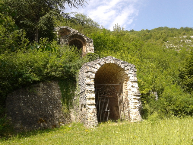 Le tre bocche del cunicolo maggiore